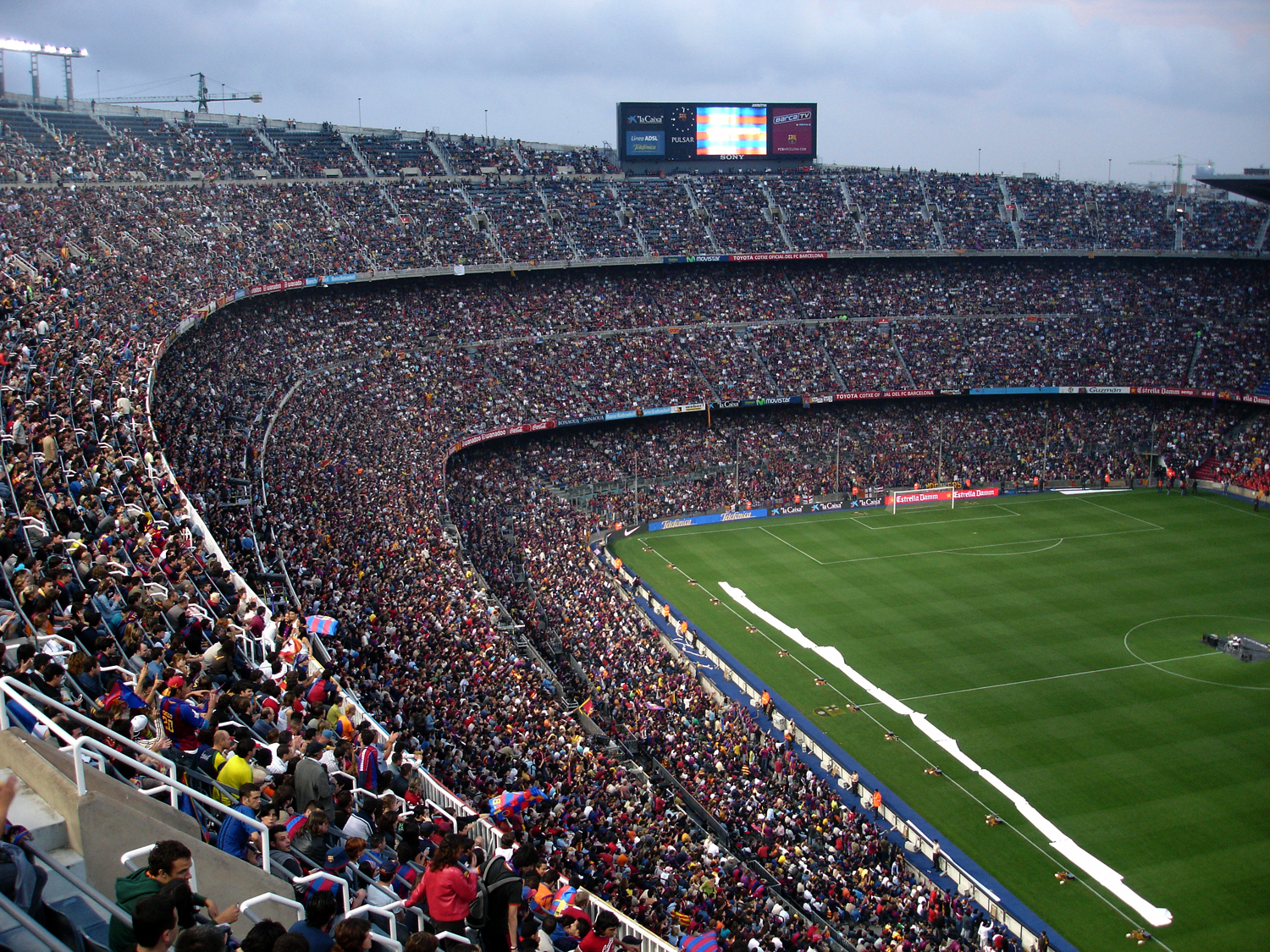 Camp Nou, Barcelona (Spain)